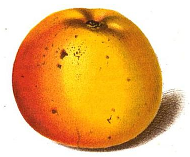 Zeichnung eines Apfels der Sorte Cludius’ Borsdorfer.